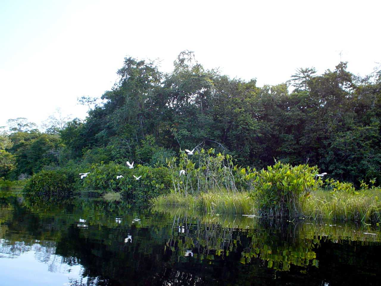 Foto de cipó tirada na Estação Ferreira Pena, na Flona de Caixiuanã, área preservada, possuindo alguns dos ecossistemas naturais mais representativos da região amazônica, como a floresta de terra firme, igapó e várzea.